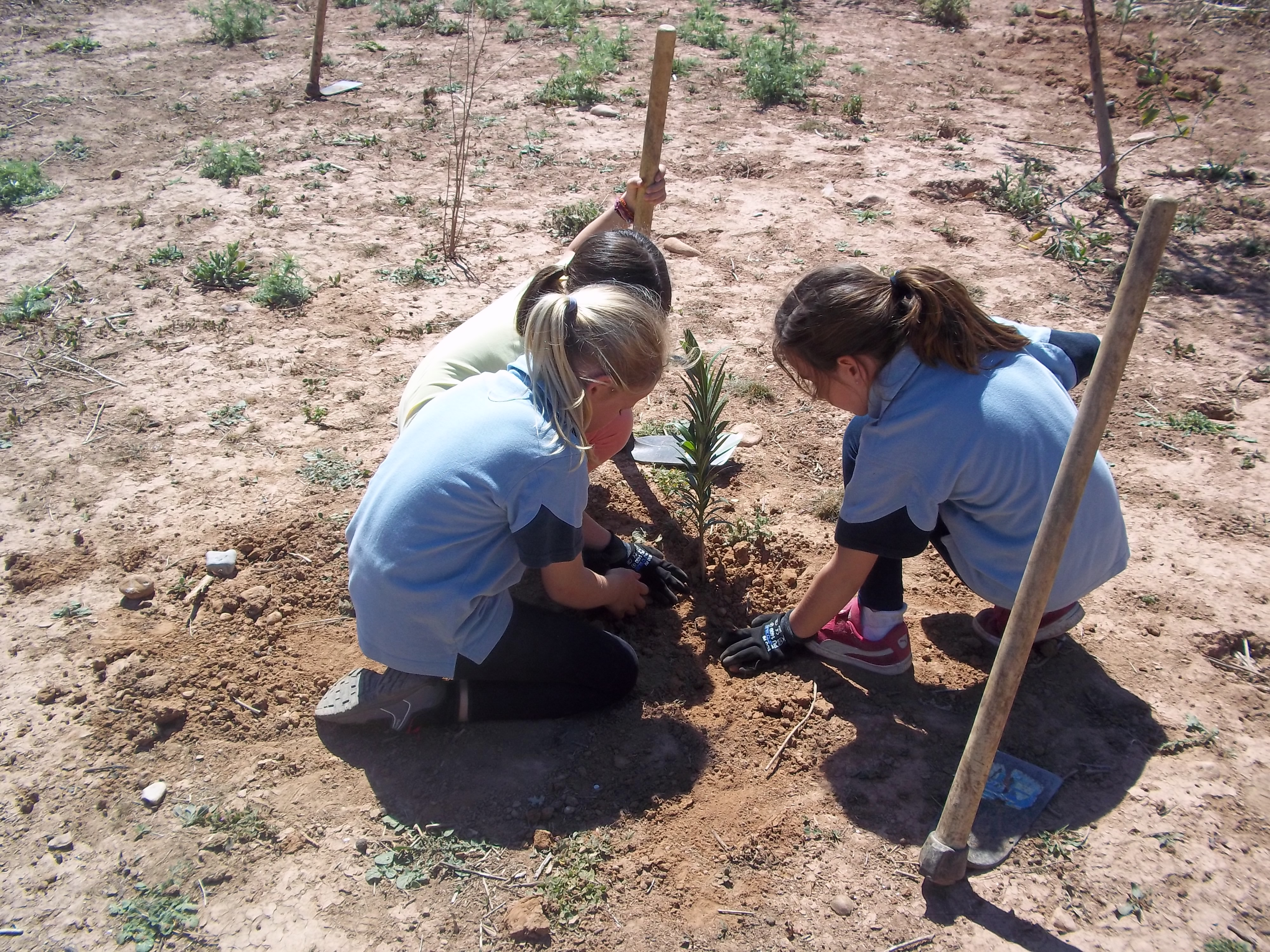 Passejada pel barranc del carraixet i plantació de lliris i baladres a l'indret del Pont Sec. Activitat de voluntariat ambiental de la Xarxa